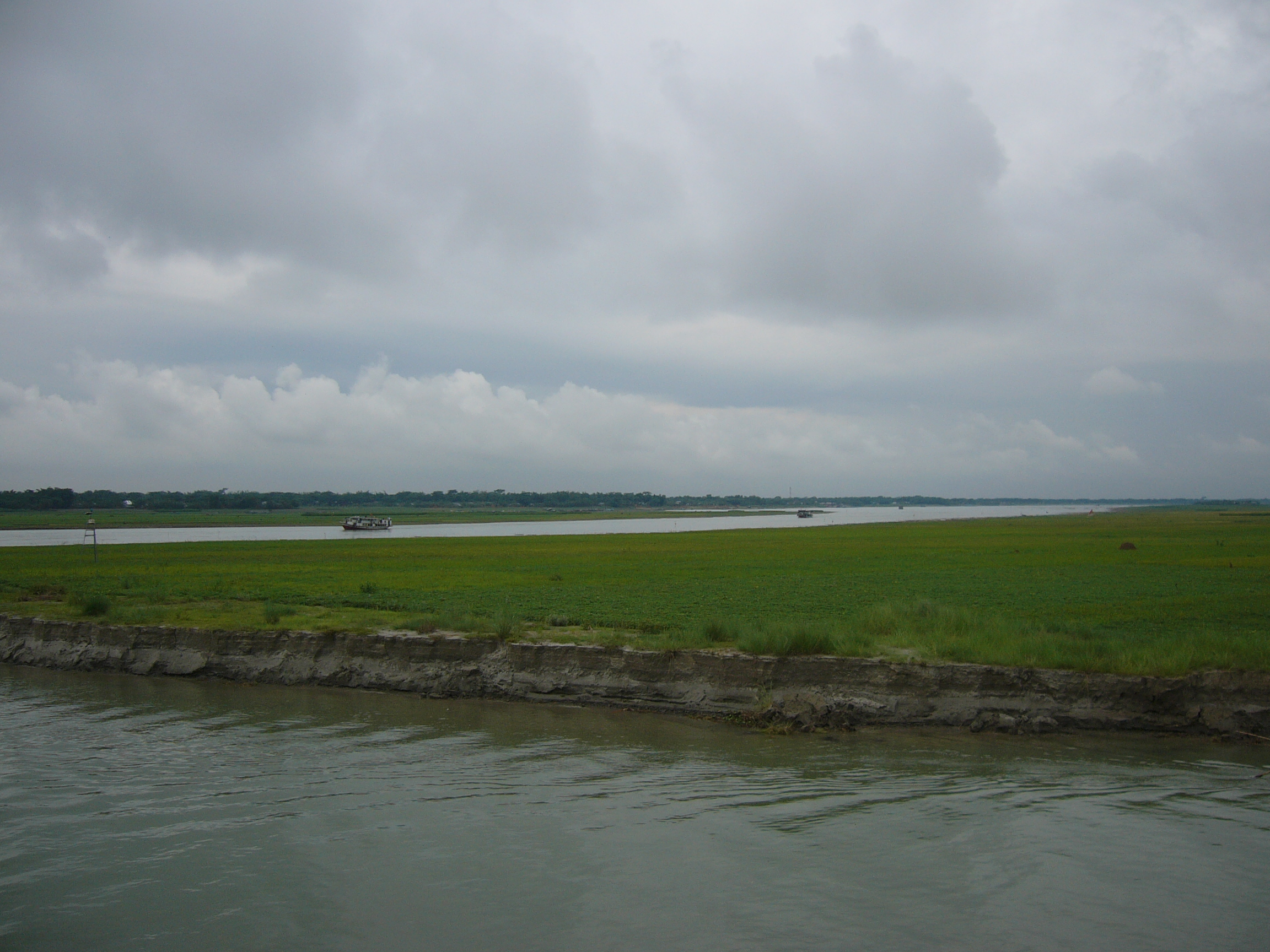 Padma River Bangladesh